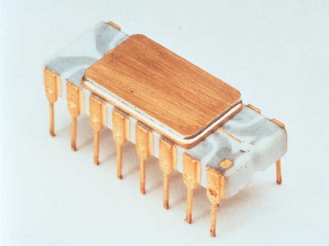 microprocessors Intel 4004